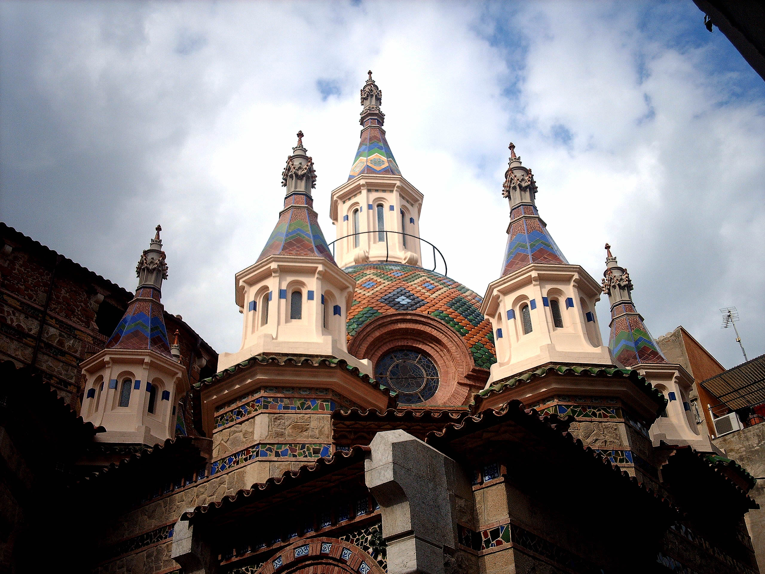 Igreja em Lloret de Mar (Gerona, Espanha)